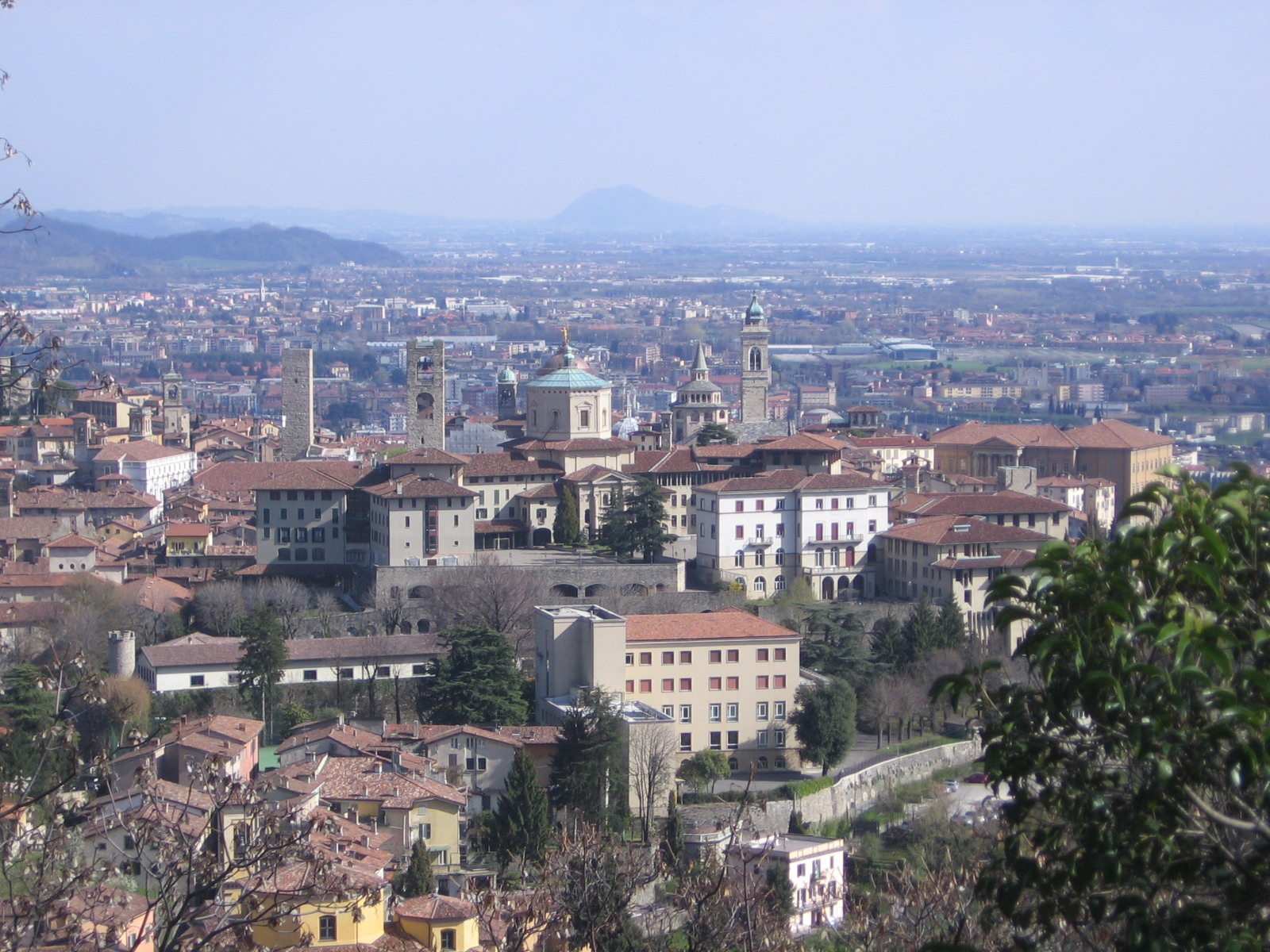 Città Alta, Bergamo, Italy